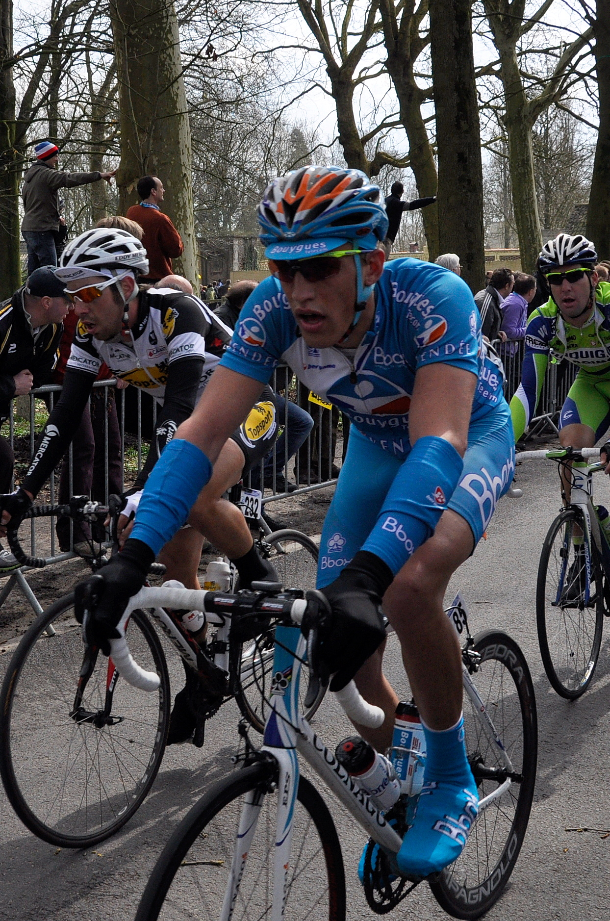 Damien Gaudin tijdens de Ronde van Vlaanderen 2010 - Den Ast te Mullem